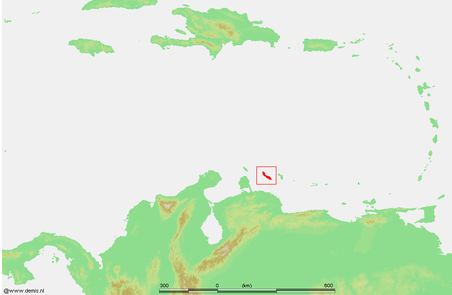 Caribbean - Curacao.PNG